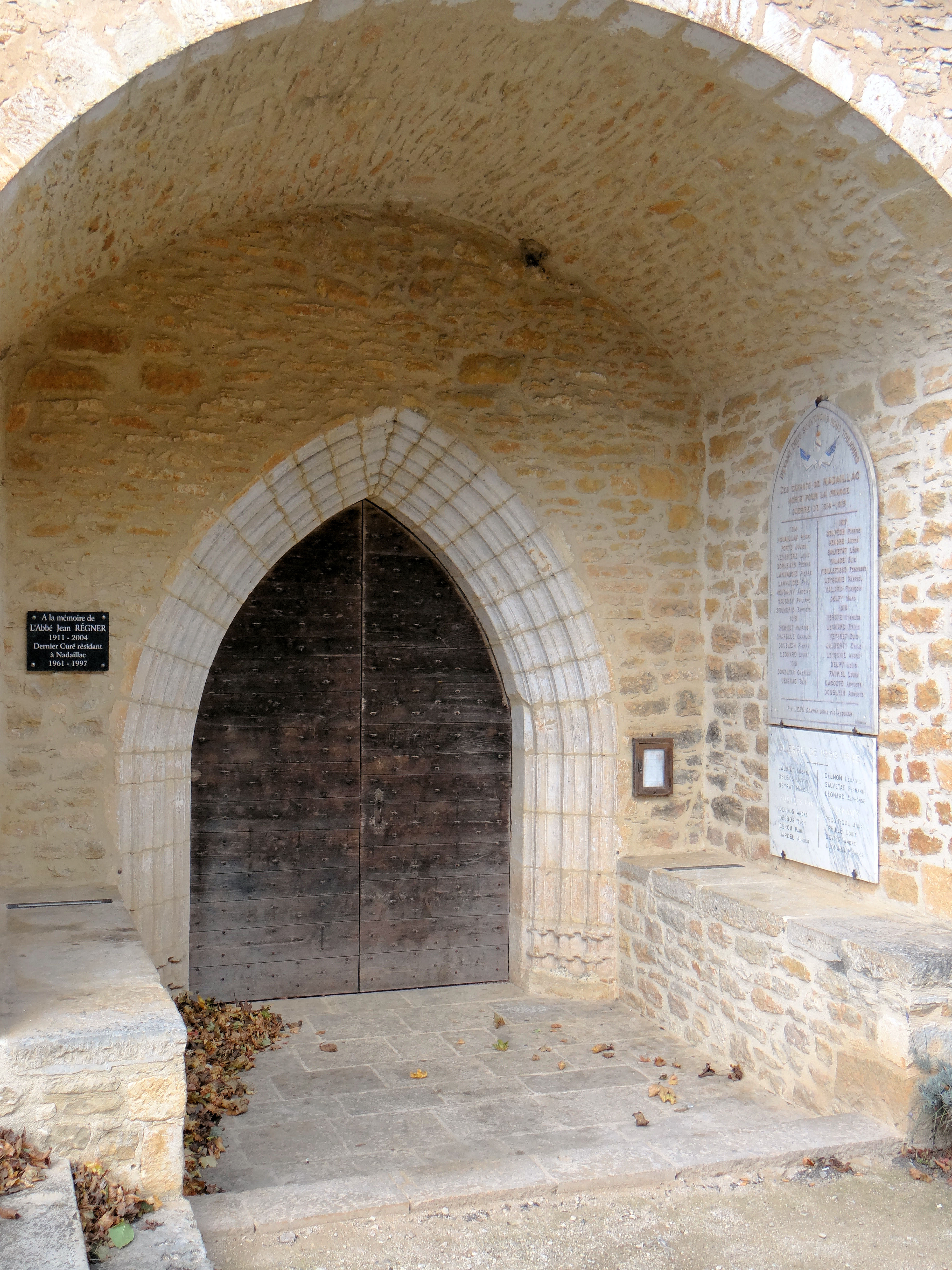 Nadaillac - Église Saint-Denis - Portail latéral